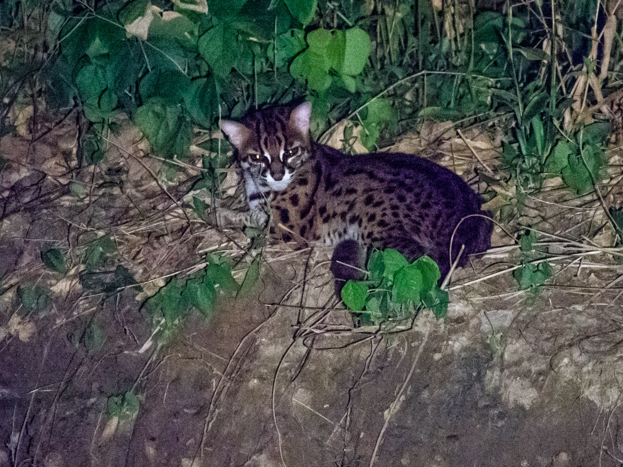 Leopard Cat